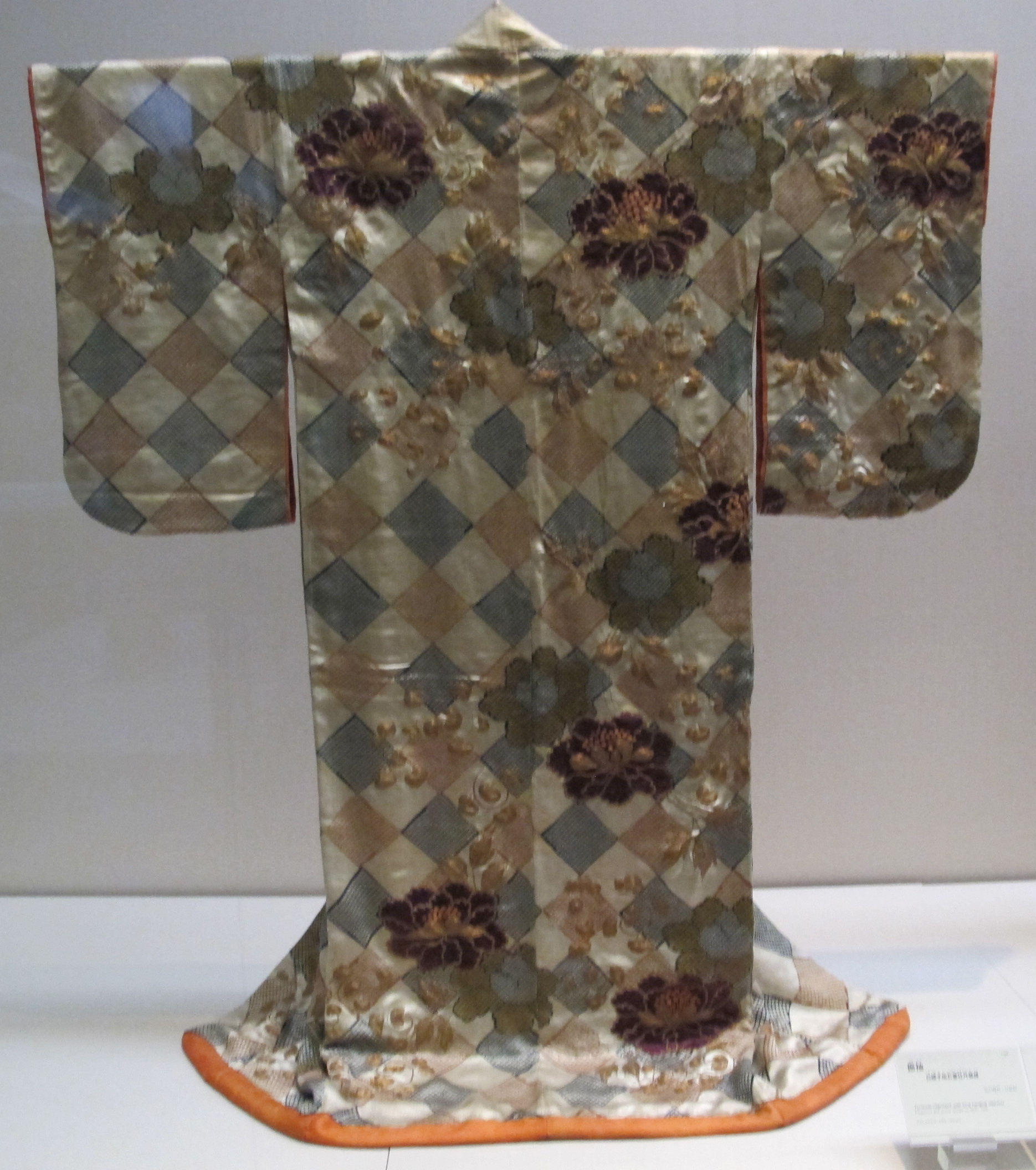 Periodo edo, furisode, XVIII sec